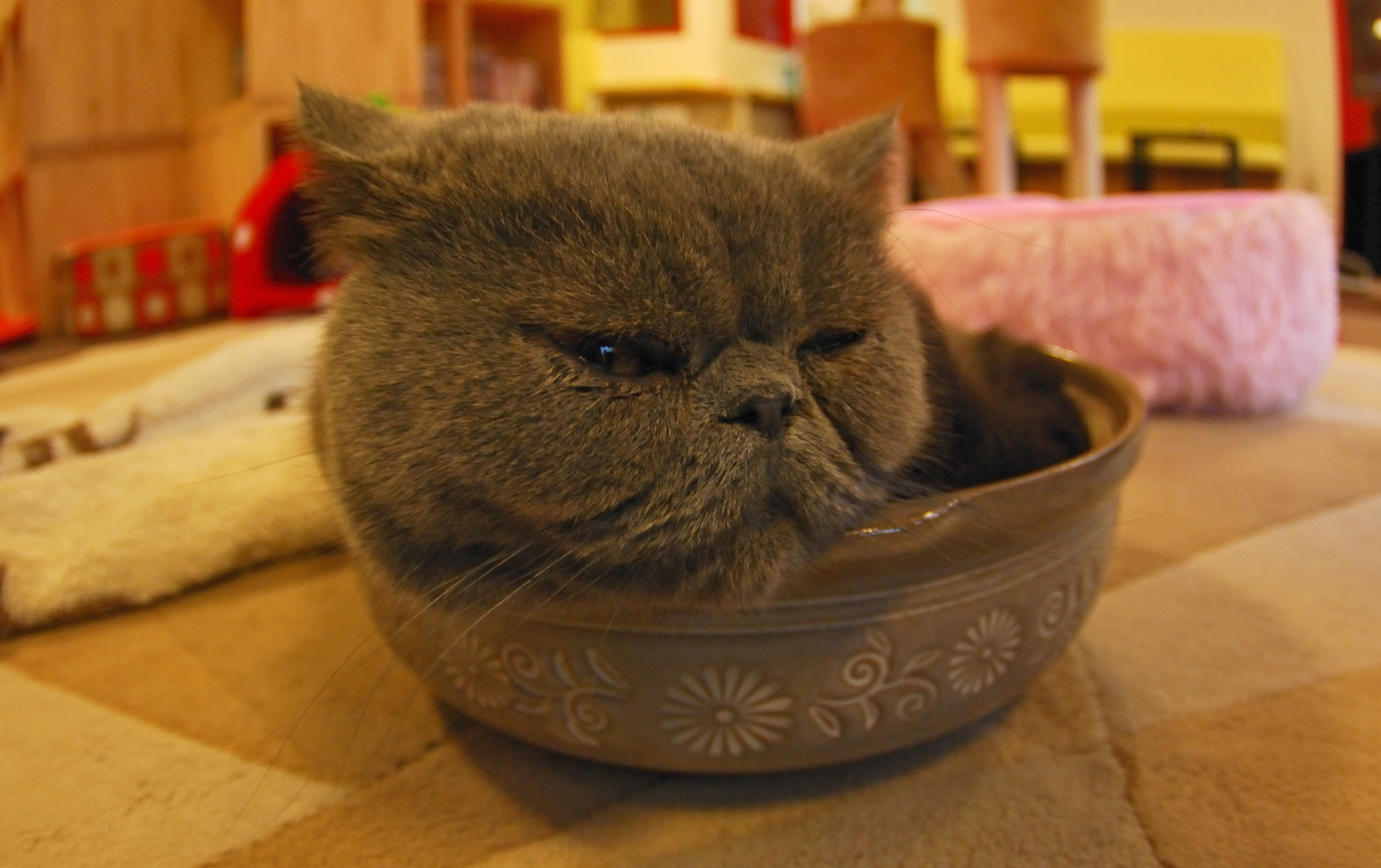 ねこ鍋(neko nabe)